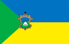 Прапор Рожнятівського району